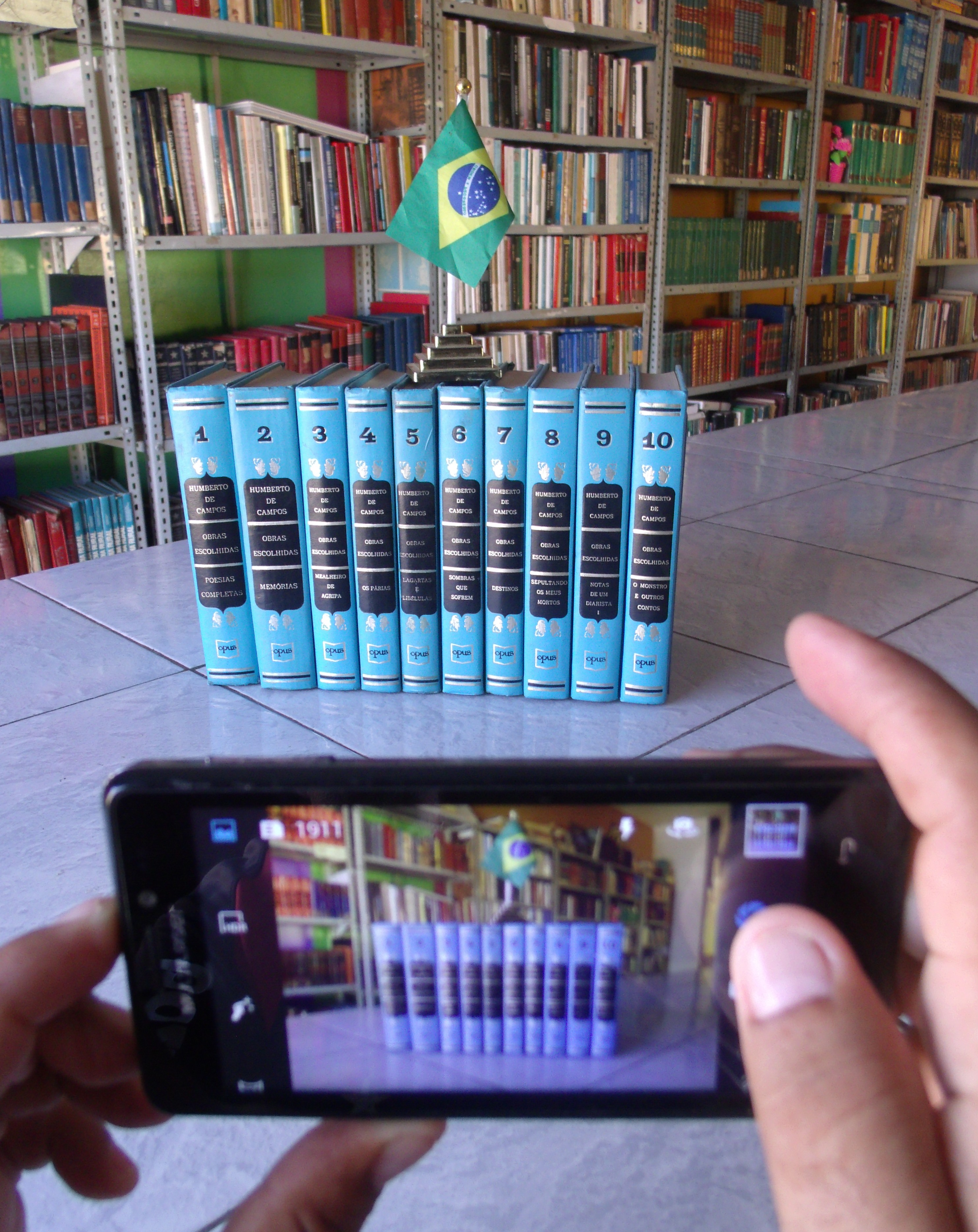 Coleção de Literatura brasileira de autoria de Humberto de Campos numa biblioteca municipal.